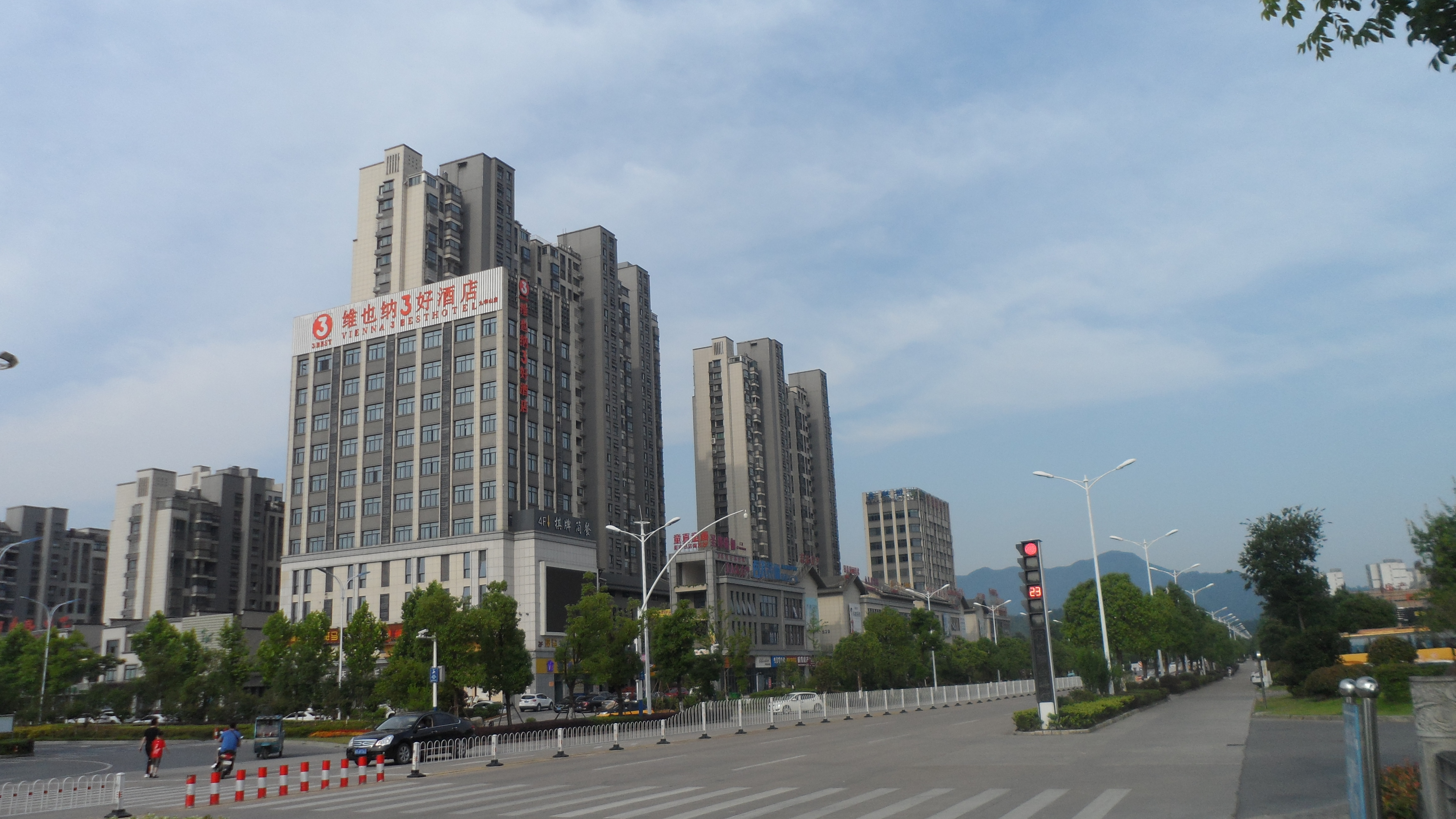 安徽池州青阳县